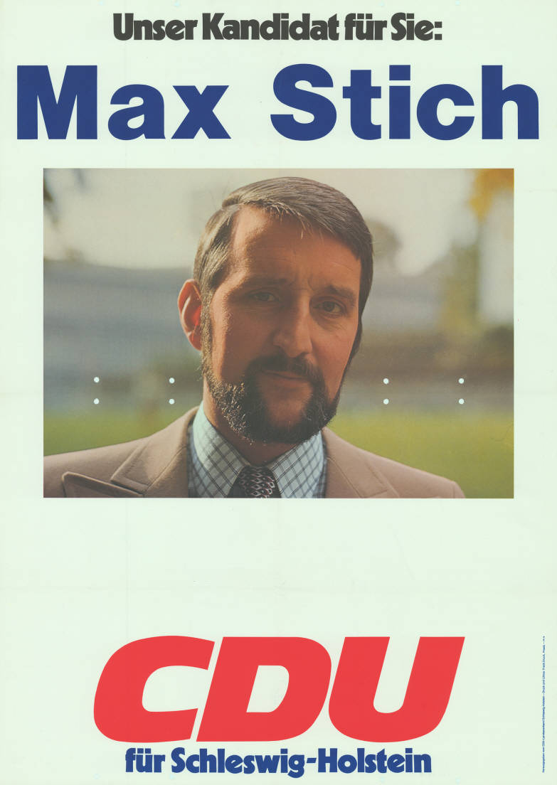 Unser Kandidat für Sie: Max Stich CDU für Schleswig-Holstein Abbildung: Porträtfoto Plakatart: Kandidaten-/Personenplakat mit Porträt Auftraggeber: CDU-Landesverband Schleswig-Holstein Drucker_Druckart_Druckort: Druck und Lithos: Frank Druck, Preetz Objekt-Signatur: 10-012 : 380 Bestand: Landtagswahlplakate Schleswig-Holstein (10-012) GliederungBestand10-18: Landtagswahlplakate Schleswig-Holstein (10-012) » CDU Lizenz: KAS/ACDP 10-012 : 380 CC-BY-SA 3.0 DE